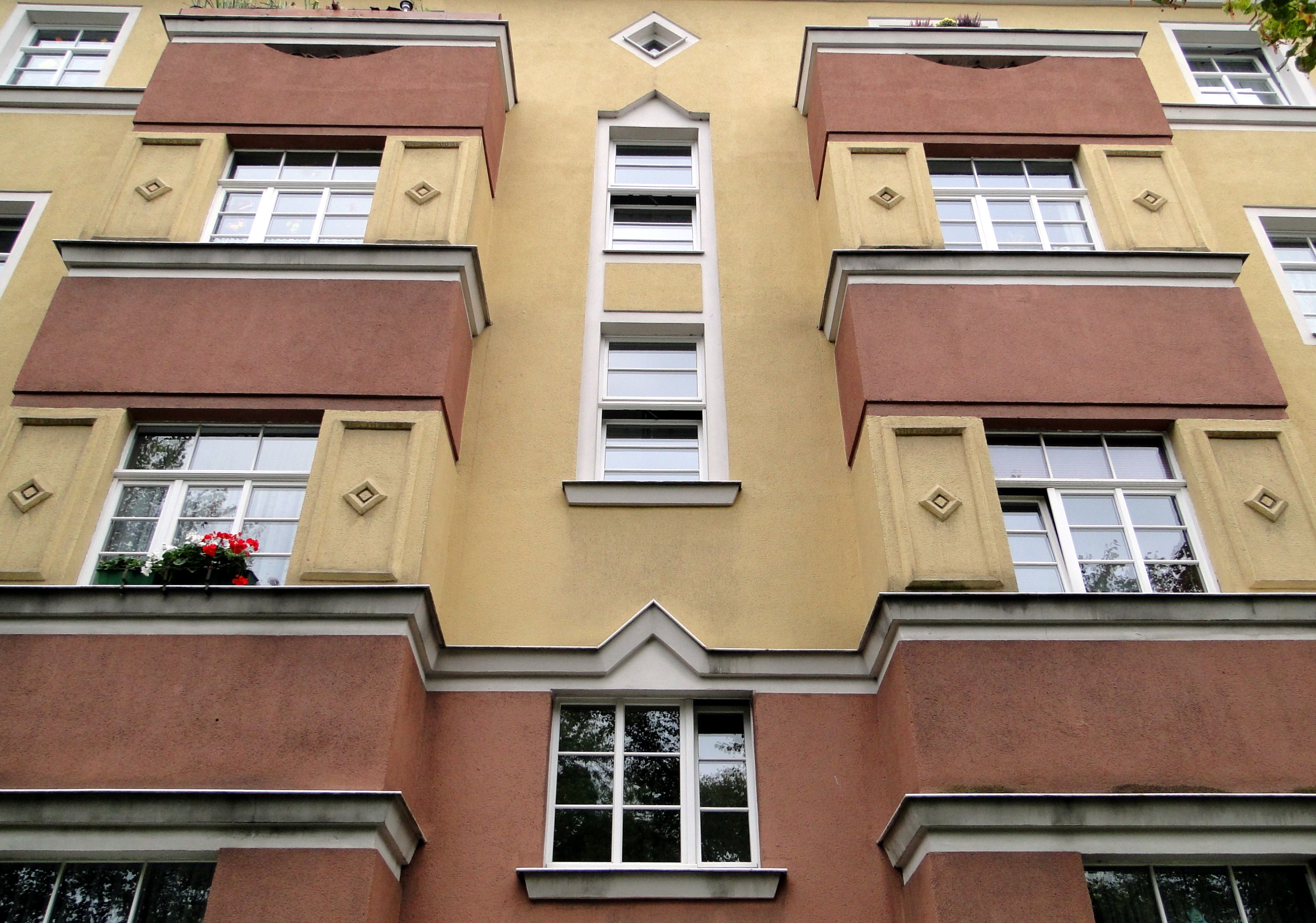 Siedlung Reick in Dresden, Fassadendetail